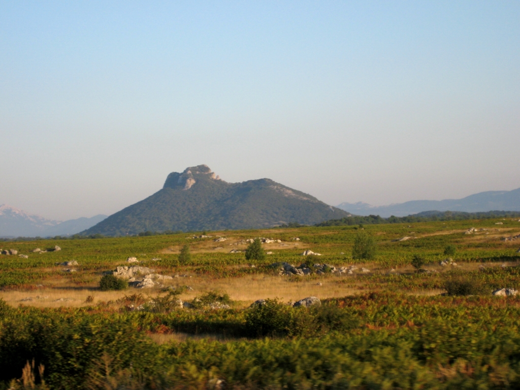 Ličko polje